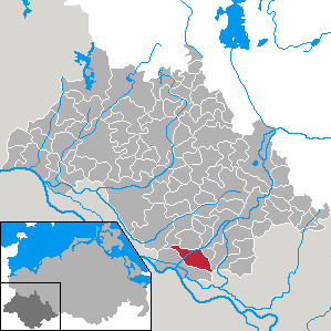 Neu Kaliß in Mecklenburg-Vorpommern - district Ludwigslust